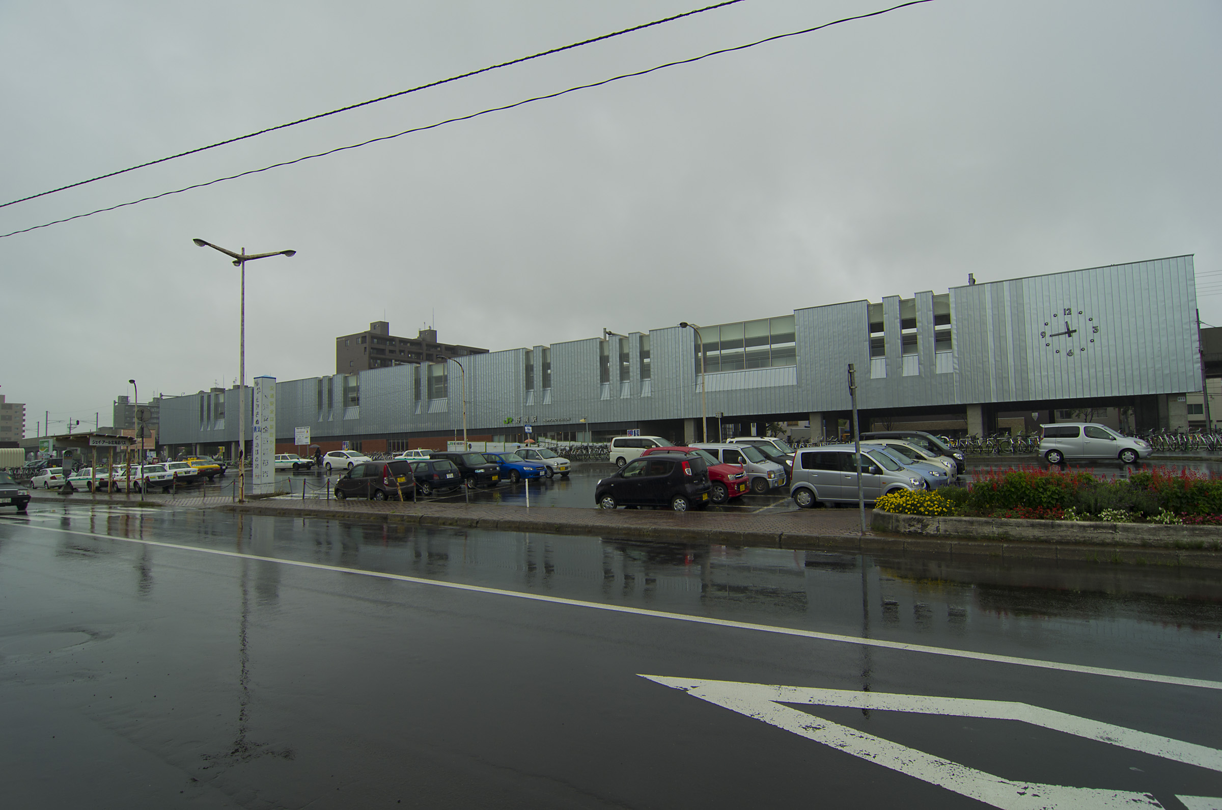 北海道旅客鉄道株式会社函館本線野幌駅北口